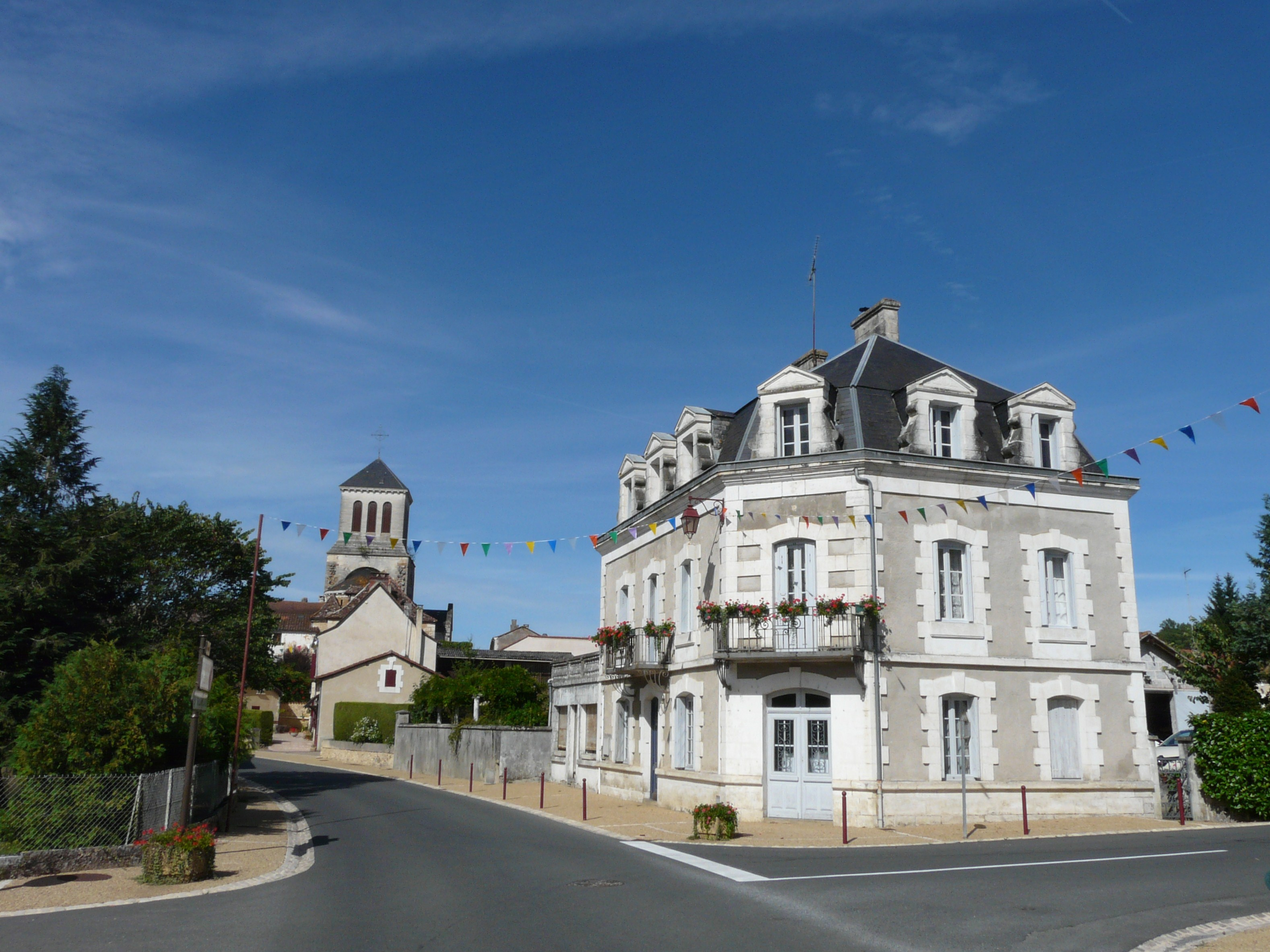 Le bourg d'Issac, Dordogne, France.